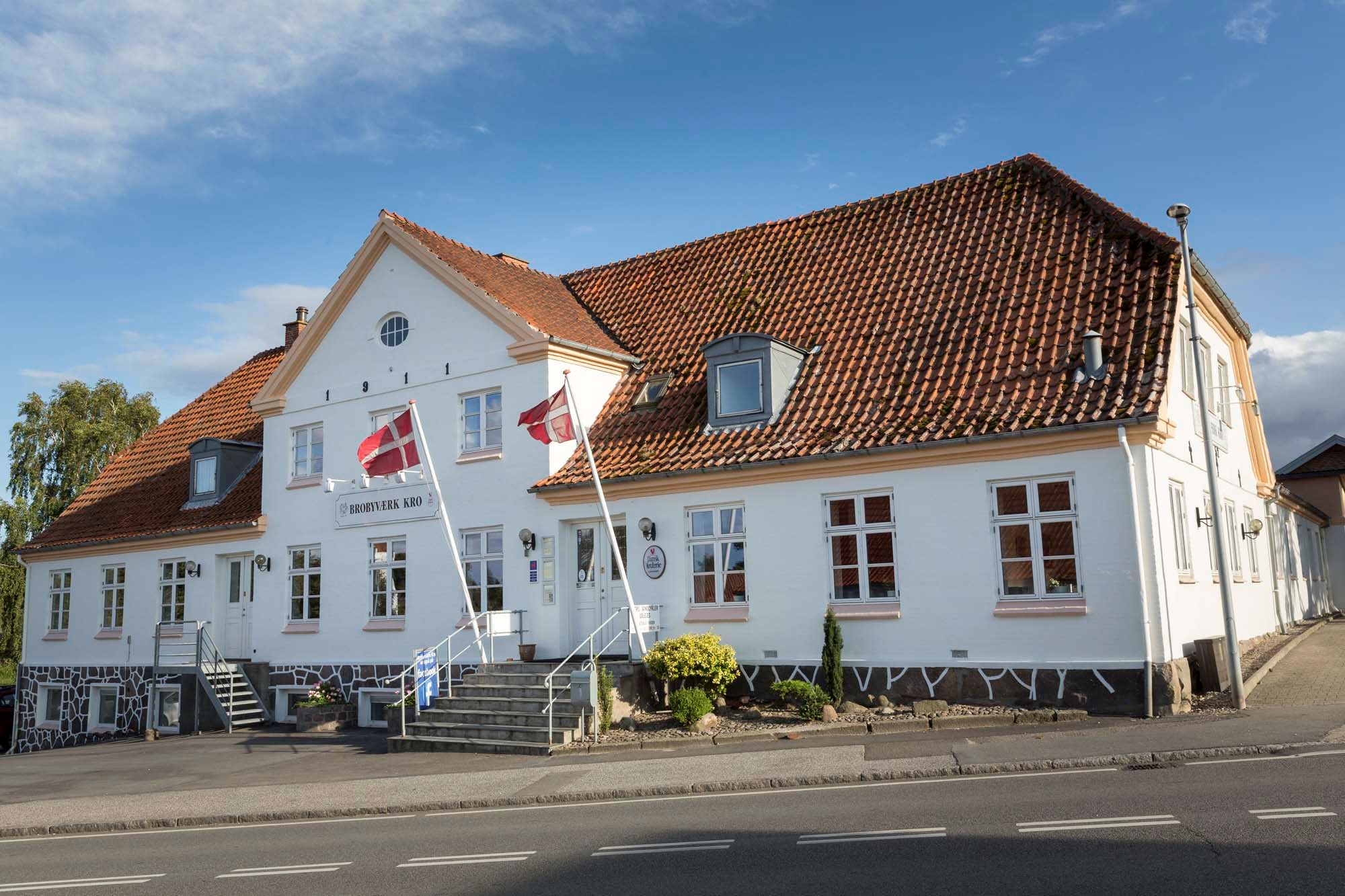 Billede fra forsiden af kroen